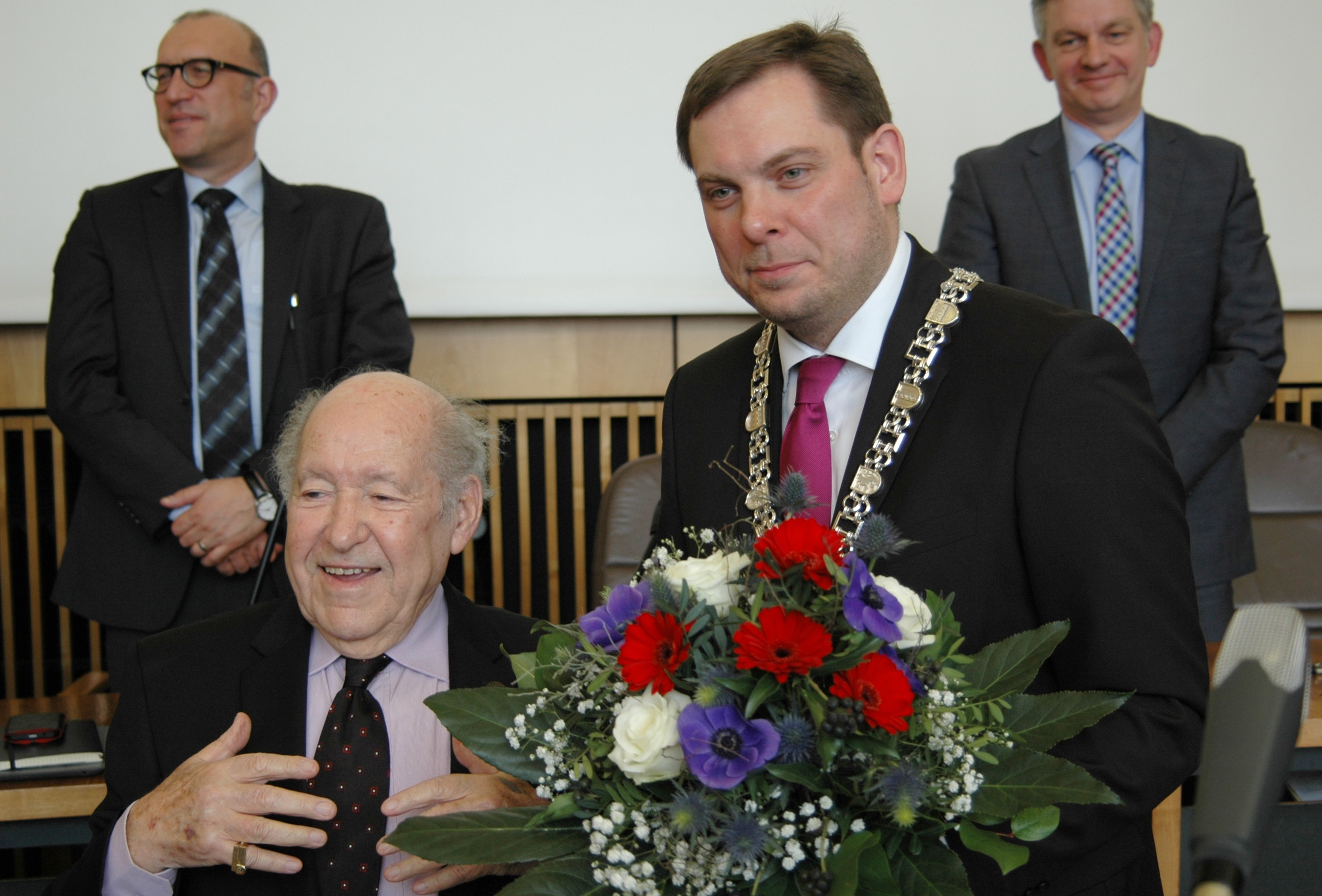 Sally Perel bei der Verleihung des Ehrenrings der Stadt Oberhausen mit Oberbürgermeister Daniel Schranz. Im Hintergrund Apostolos Tsalastras (li.) und Jürgen Schmidt (re.)